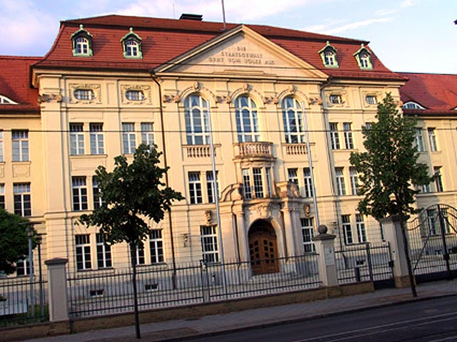 Die Brandenburger Staatskanzlei in der Teltower Vorstadt, Heinrich-Mann-Allee 107. Ehemals befand sich ein Militär-Waisenhauslazarett und eine Kadettenanstalt auf dem Gelände.